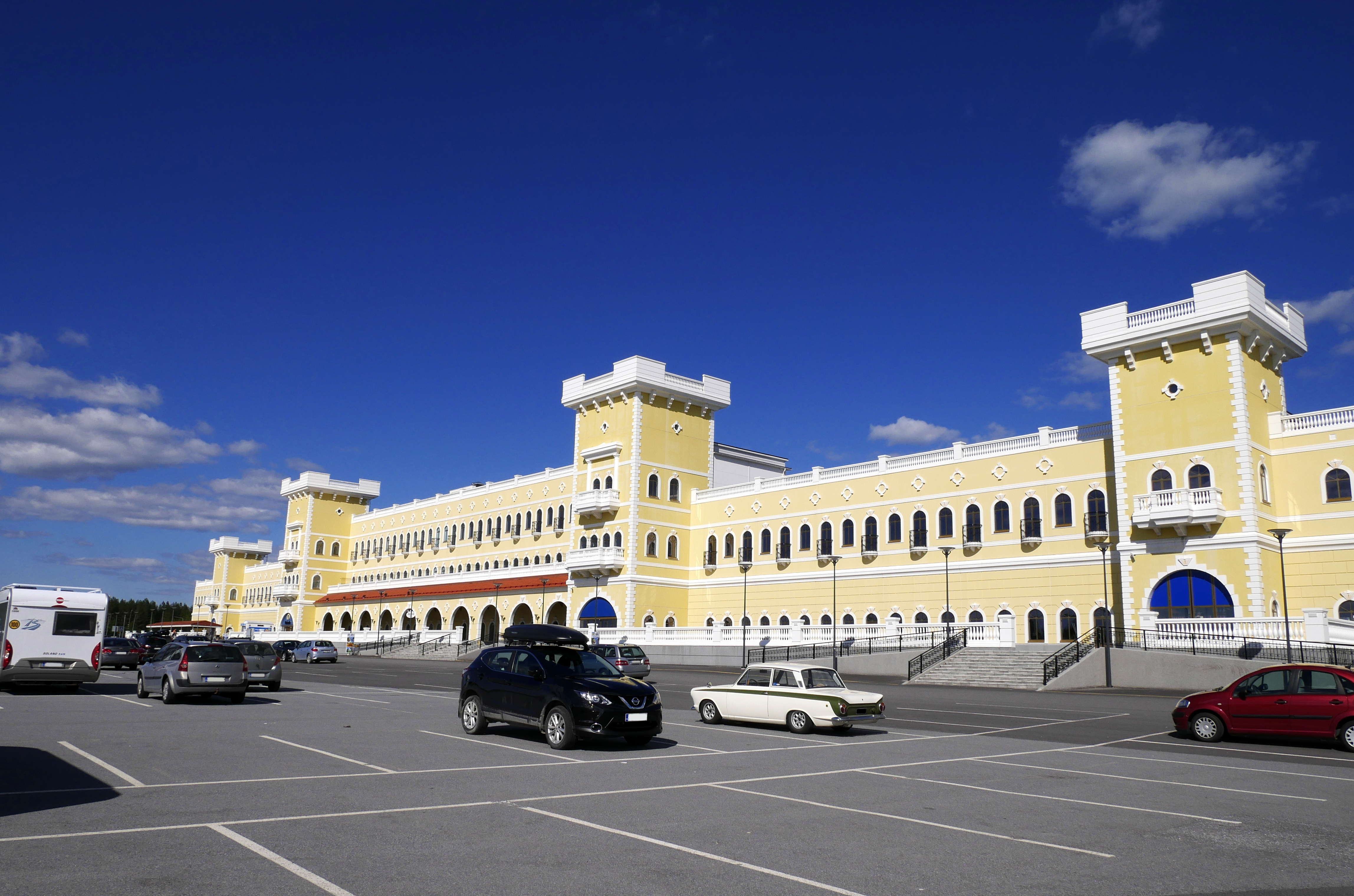 Veljekset Keskisen ruokapuoti kesäkuussa 2017.